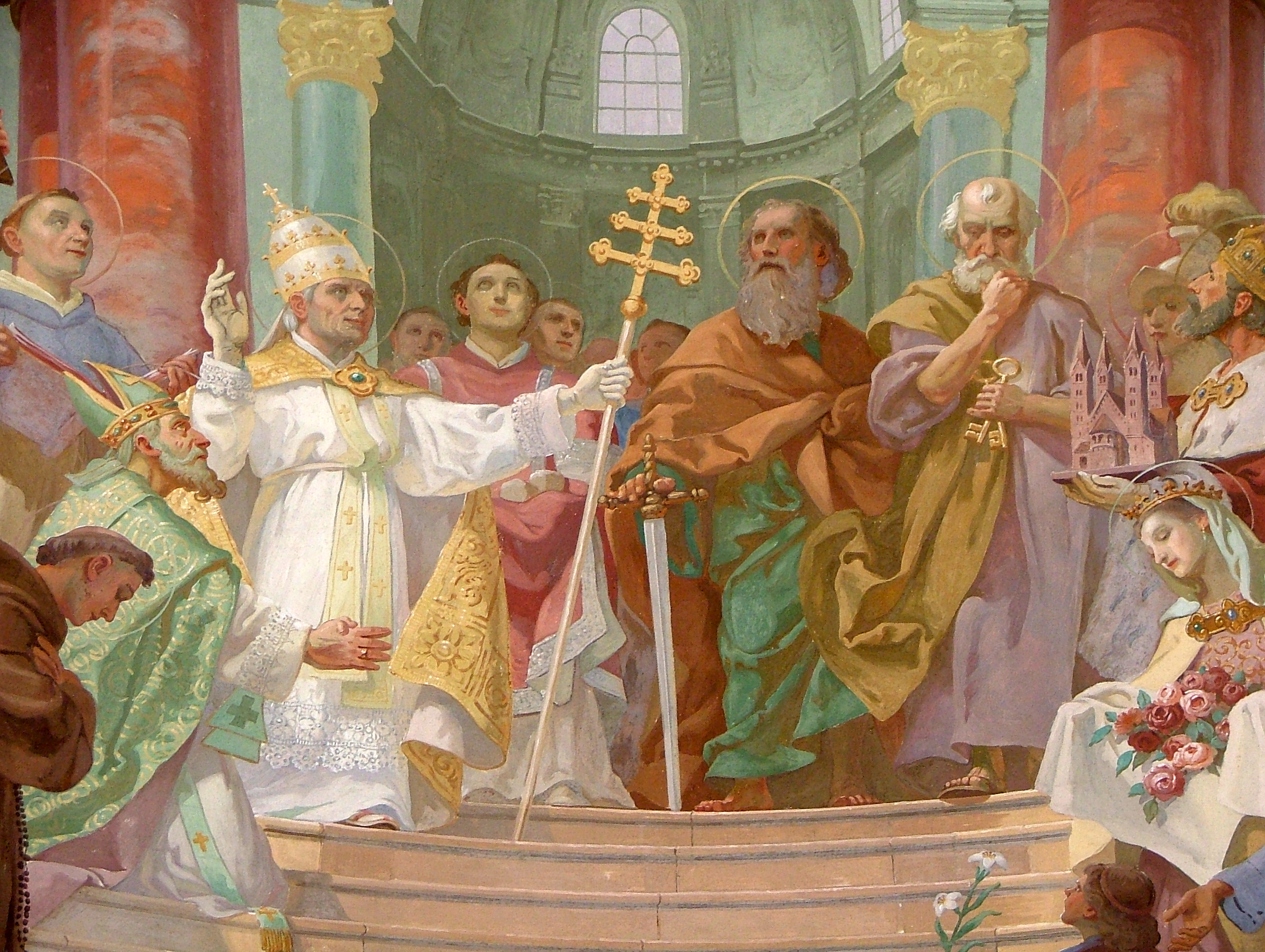 Von Oswald Völkel Gräfeling